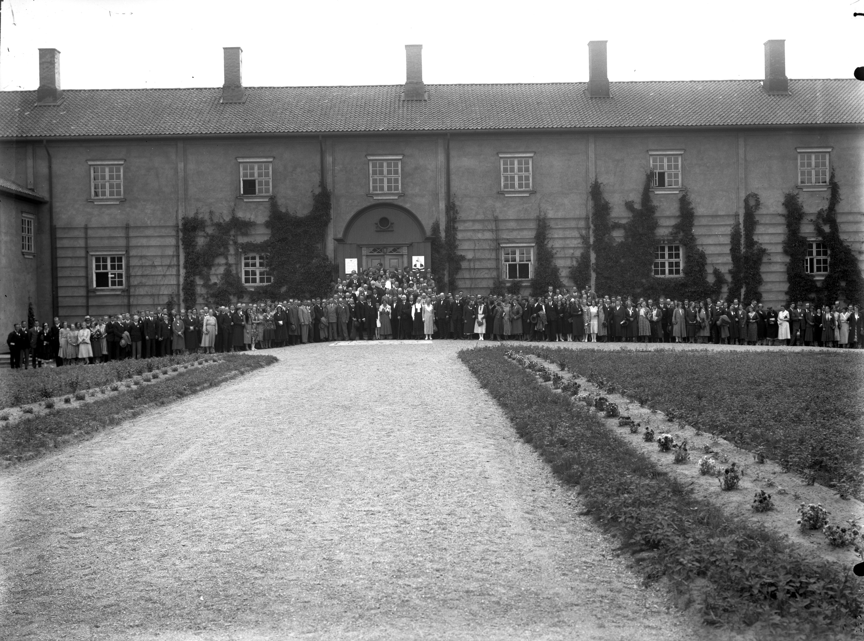 Elverum lærerskole, ukjent dato